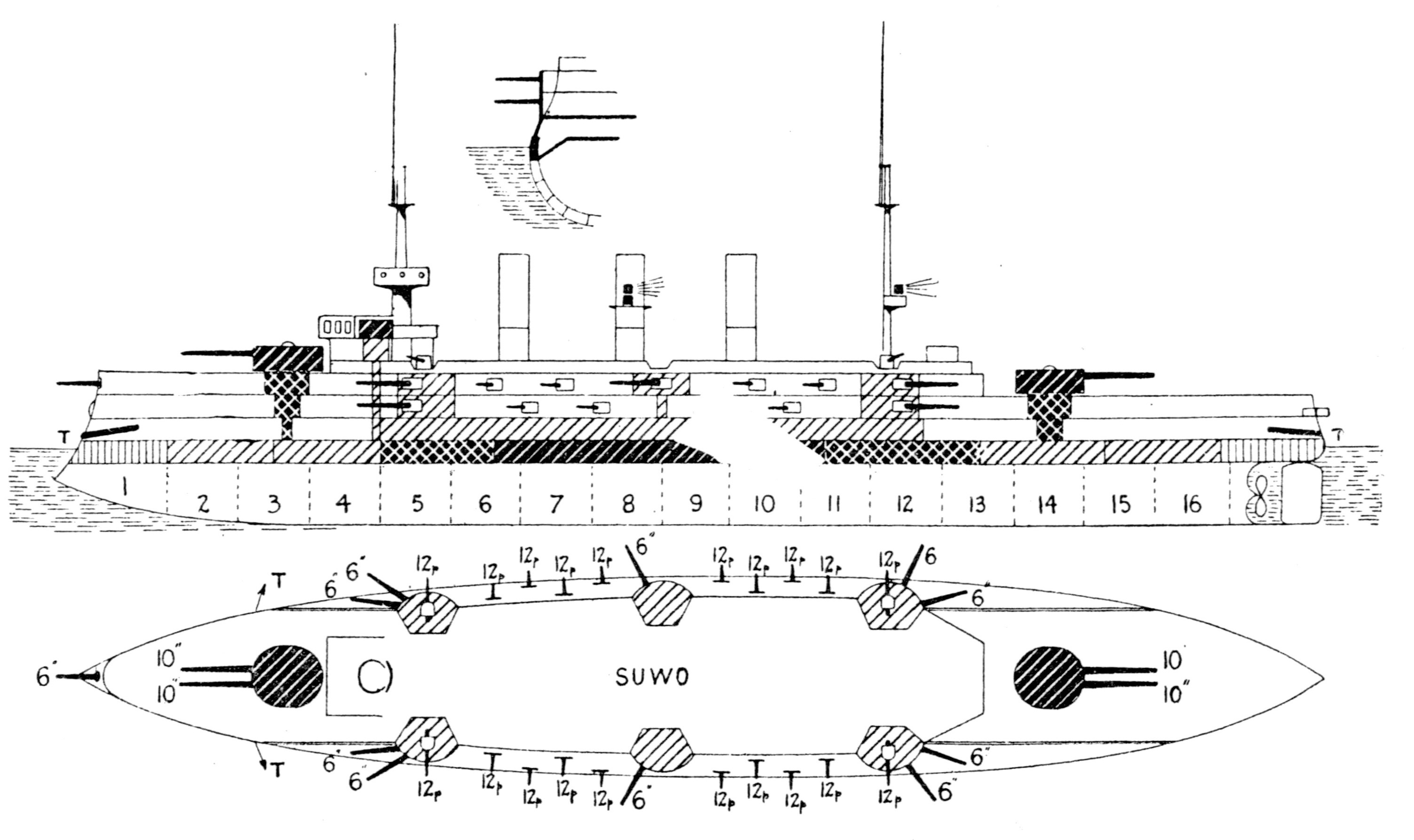 ロシア帝国海軍の戦艦「ポベーダ」、のち大日本帝国海軍の戦艦「周防」